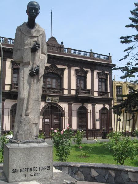 Fachada de la casa donde naciera San Martin de Porres, actualmente sede de la casa Hogar que lleva su nombre donde se realiza actividades de bien social.